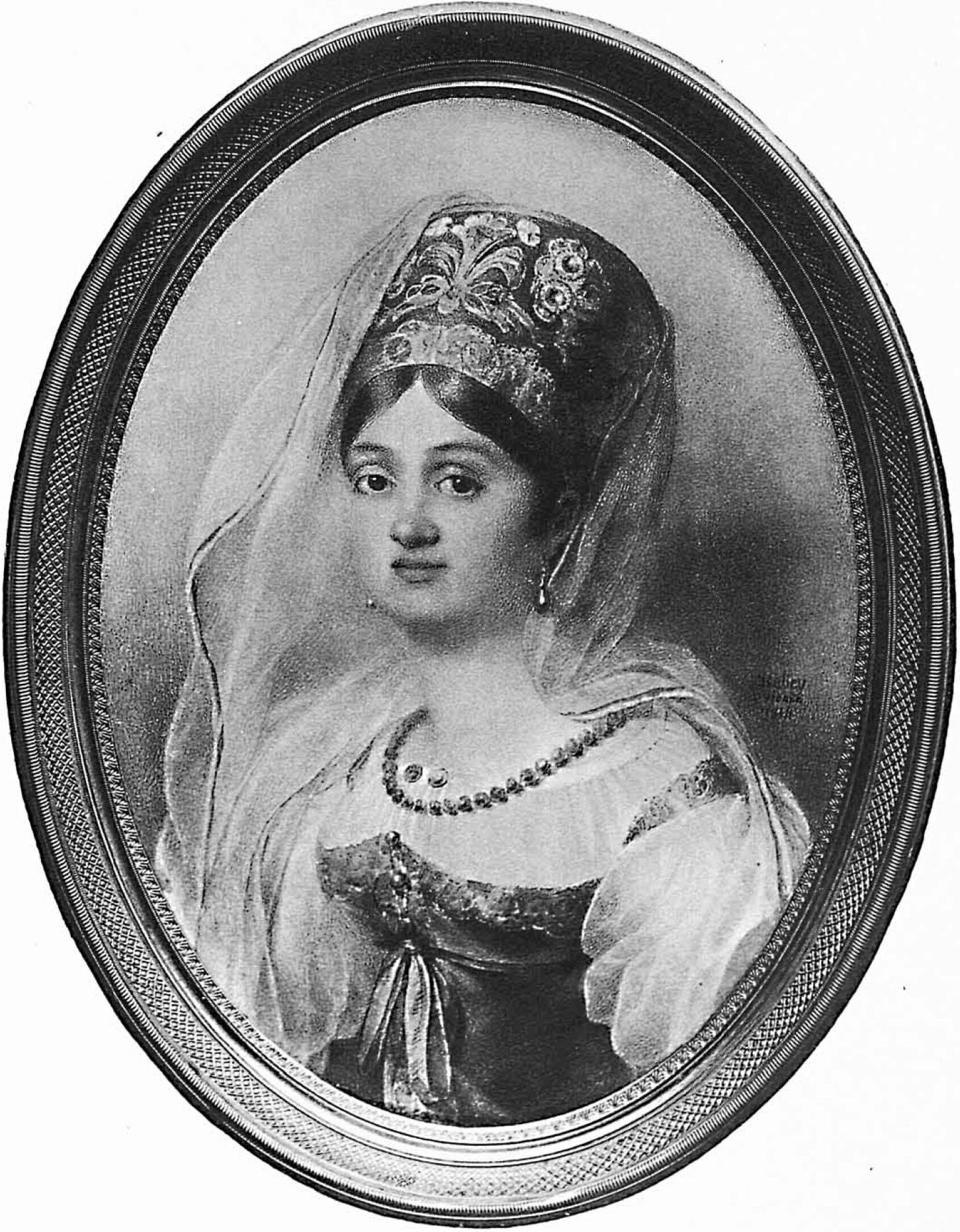 Варвара Алексеевна Репнина, урож.графиня Разумовская (1778—1864), с 1802 года жена князя Николая Григорьевича Репнина-Волконского (1778—1845)